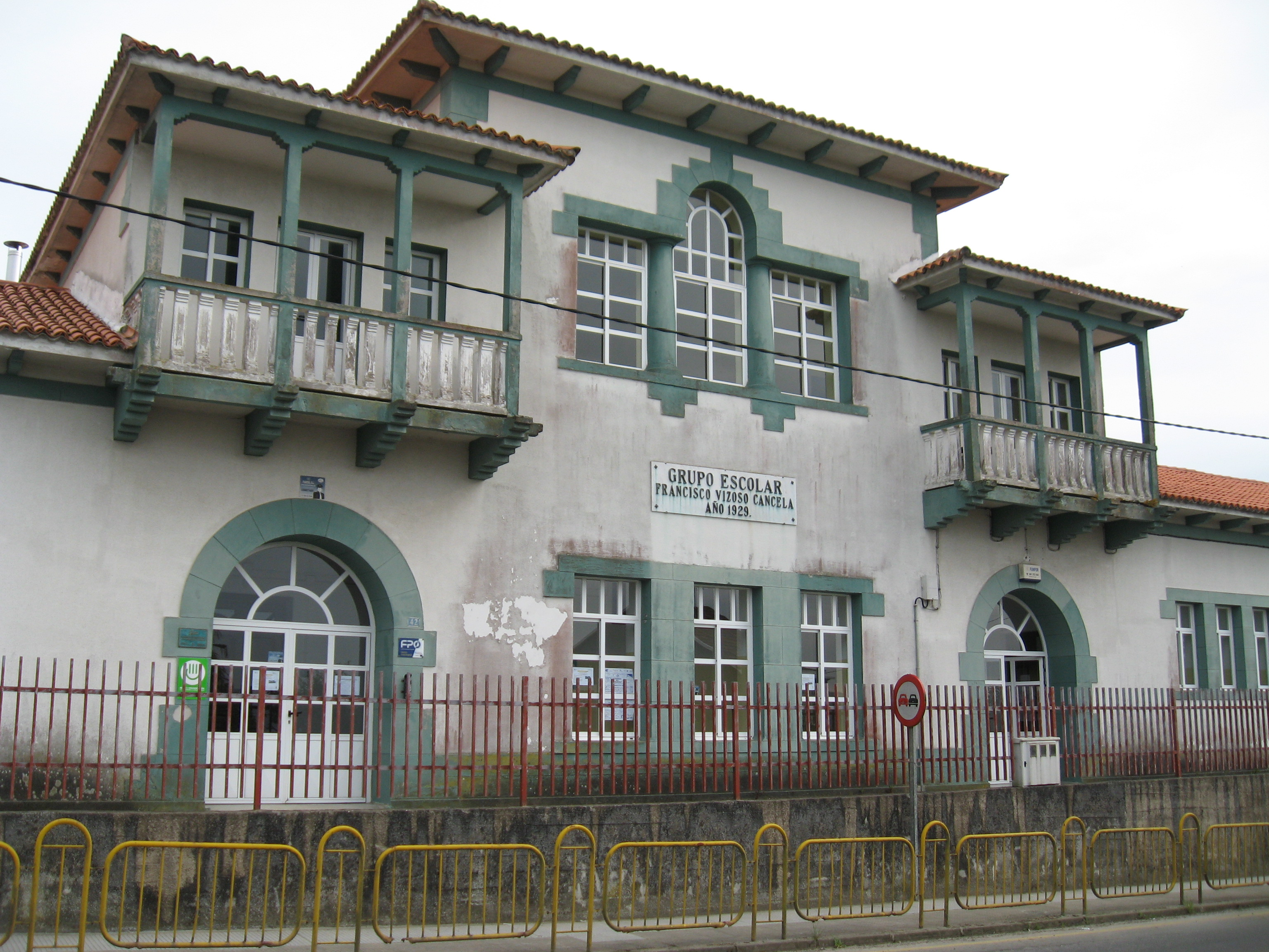 Colégio de estilo 'indiano', de 1929. Grupo escolar Francisco Vizoso Cancela